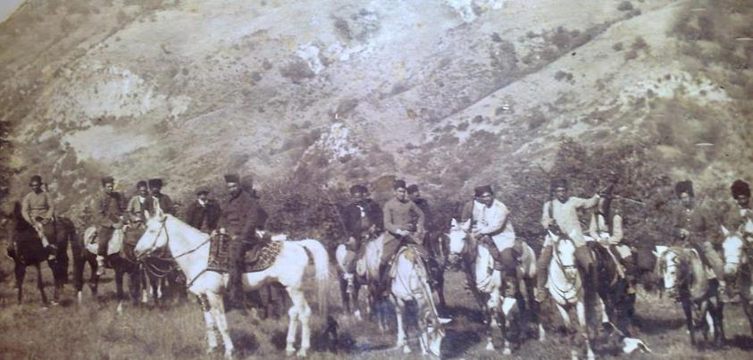 فریدون وایرج وحید از خاندان معروف ترکان بغایری در حال آرایش نظامی در منطقه بام